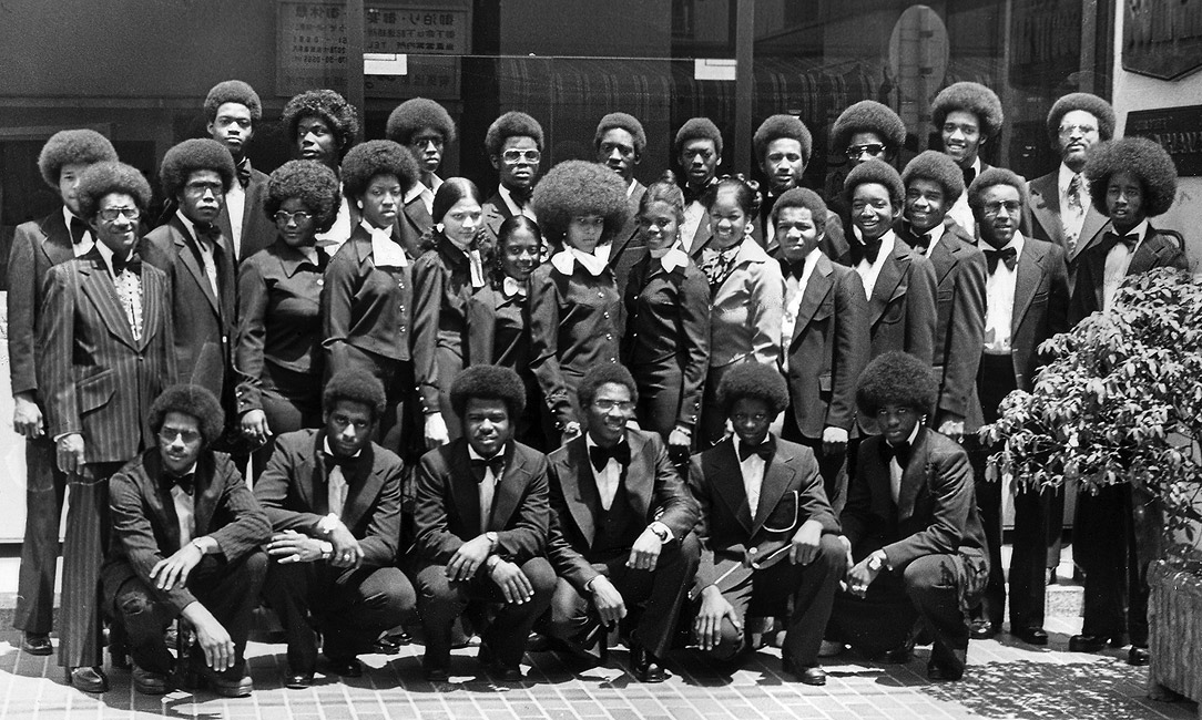 Kashmere Stage Band